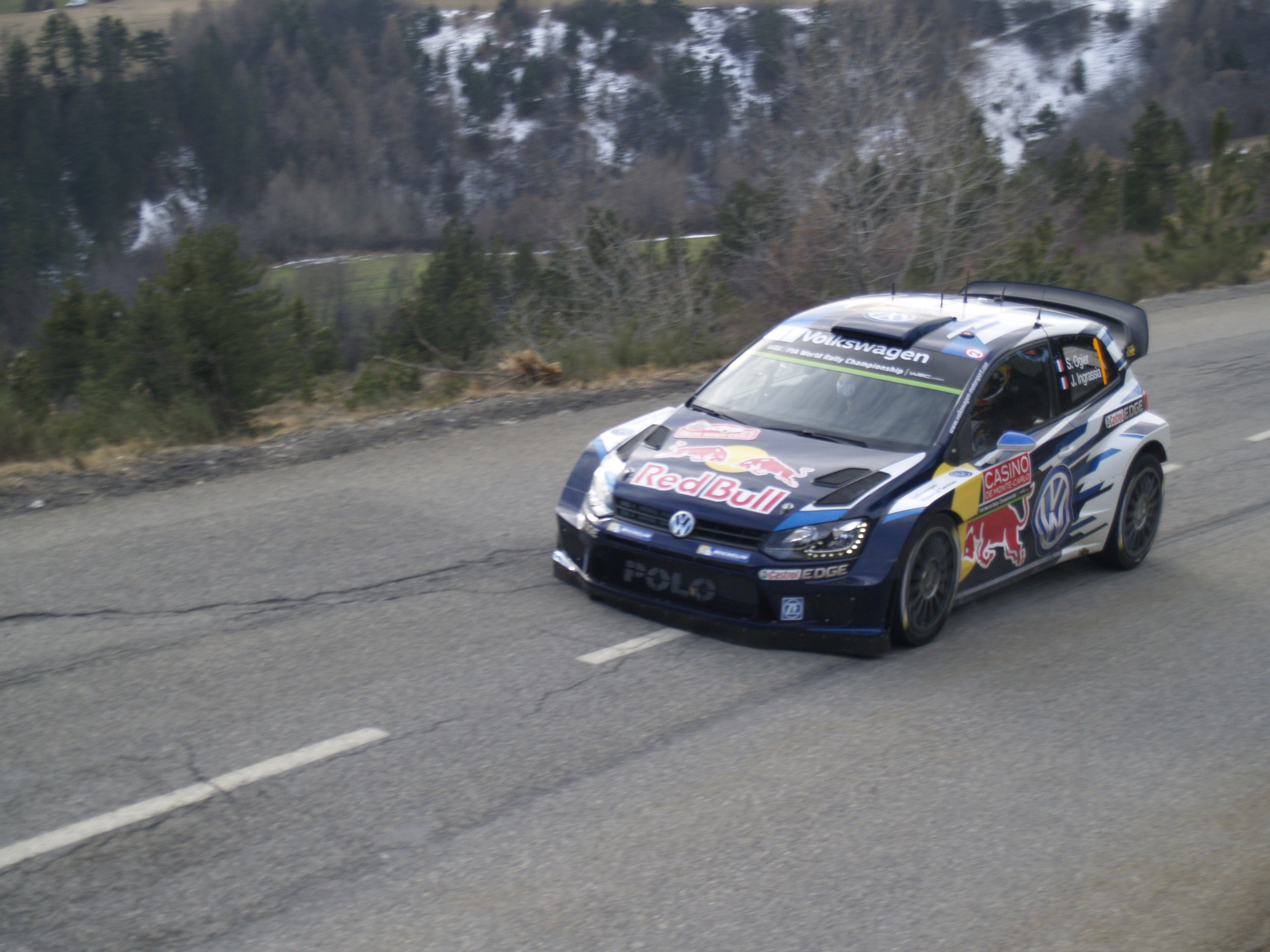 Sébastien Ogier en el Rally de Montecarlo.